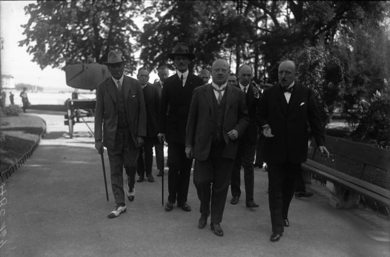 Aussenminister Stresemann, von Schubert, Graf Bernstorff, Breitscheid, Gans